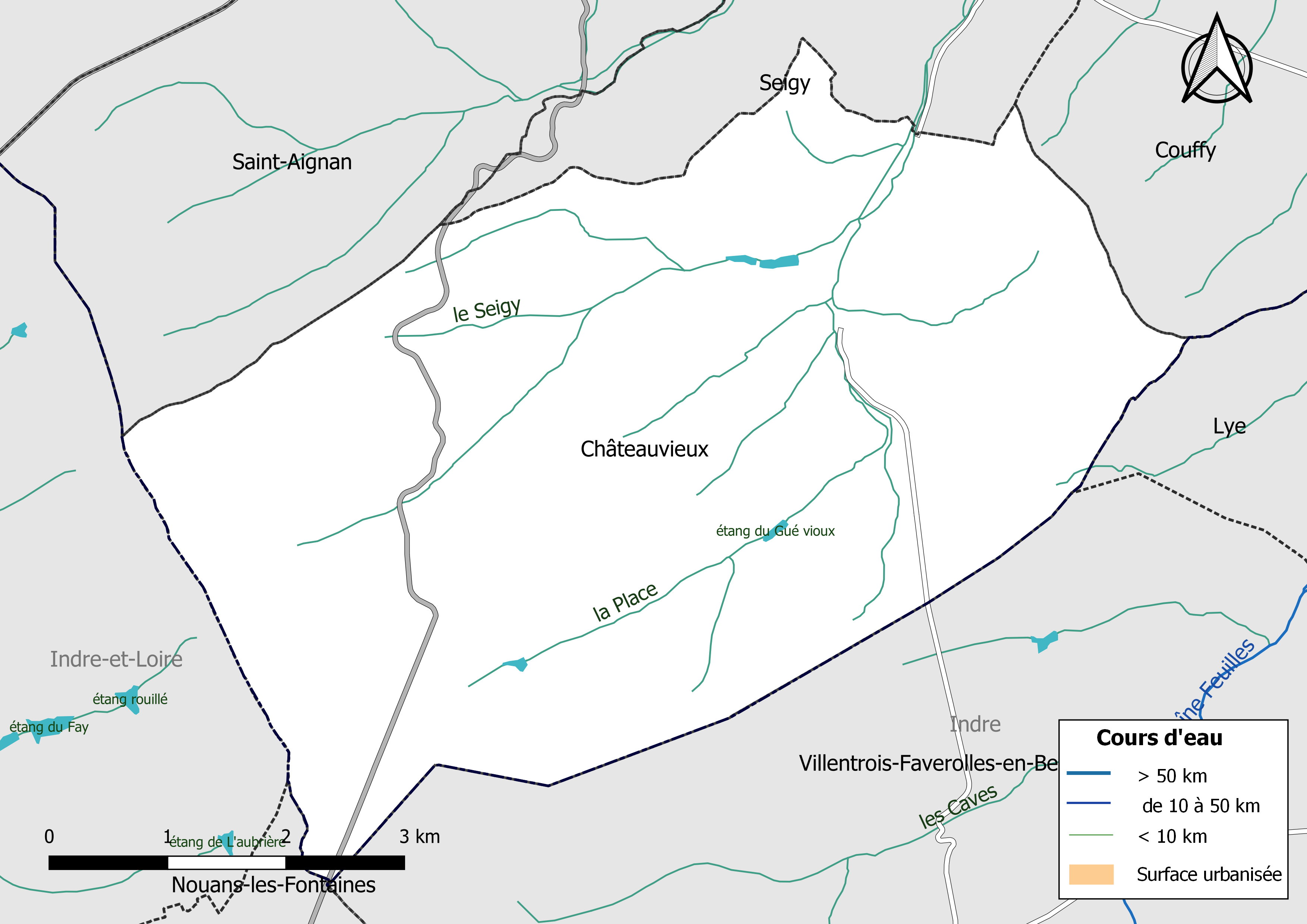 Carte du réseau hydrographique de la commune de Châteauvieux (Loir-et-Cher) (France).